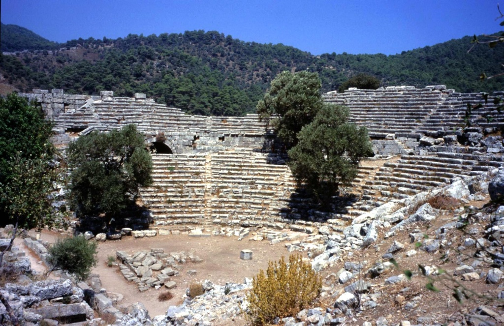 Caunos, Turkey: Ancient Theatre (de: Kaunos)